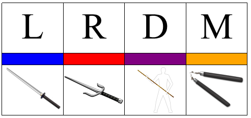 Tabella riassunttiva dei:nomi, colori, armi delle Tartarughe Ninja